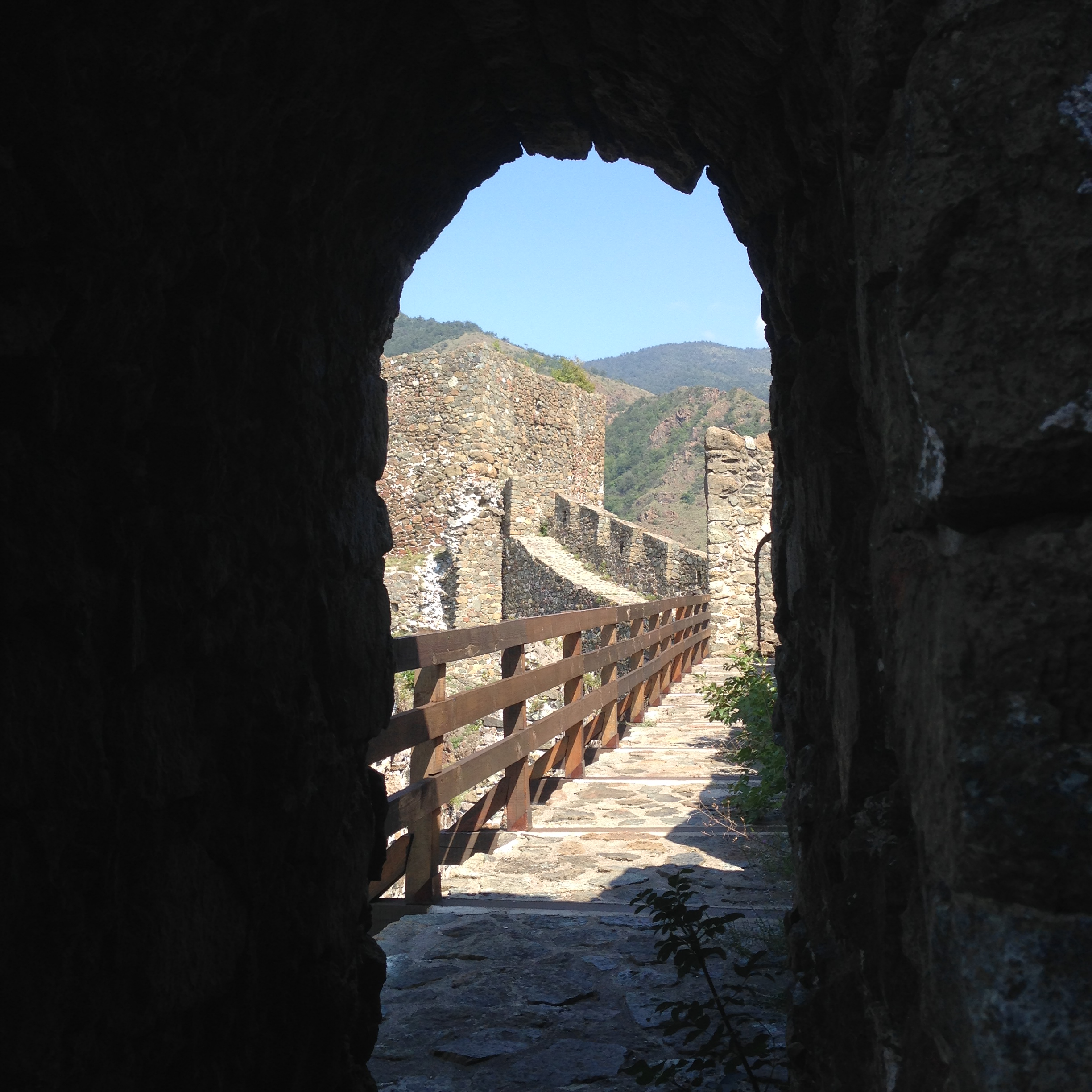 Maglic Fortress